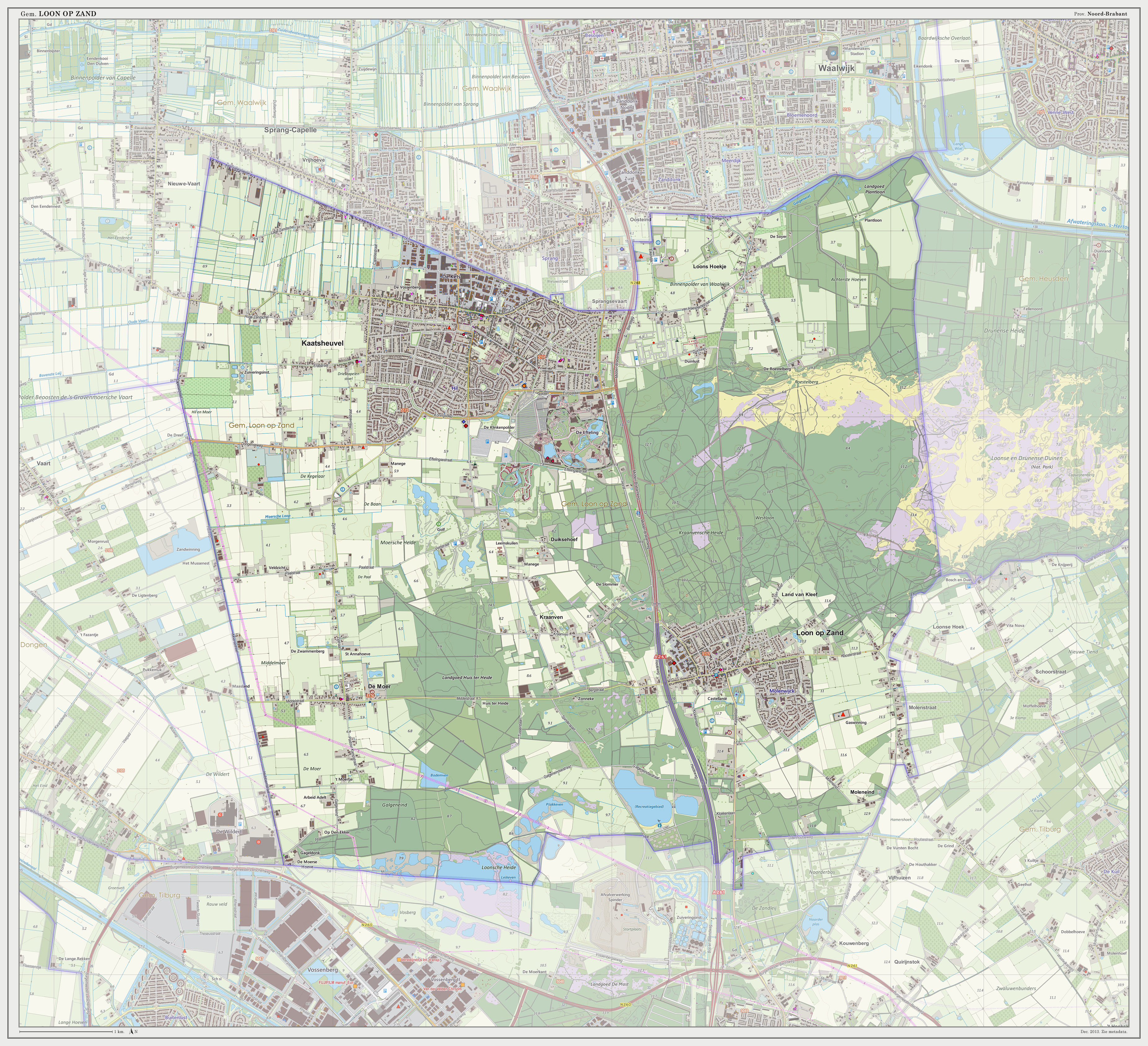 Topografische gemeentekaart. Resolutie: 300 pixels/km. Kaartbeeld samengesteld met de open geodata van de Top10NL en Top25namen (Basisregistratie Topografie, Kadaster 30-nov-2013), o.b.v. Creative Commons BY licentie. Gebouwvlakken uit Open Geodata BAG extract (8-dec-2013). Wegen uit de OpenStreetMap (15-dec-2013). Samenstelling en kleurenschema: Jan-Willem van Aalst, met QGIS2 en Adobe Photoshop. Zie ook de Legenda.